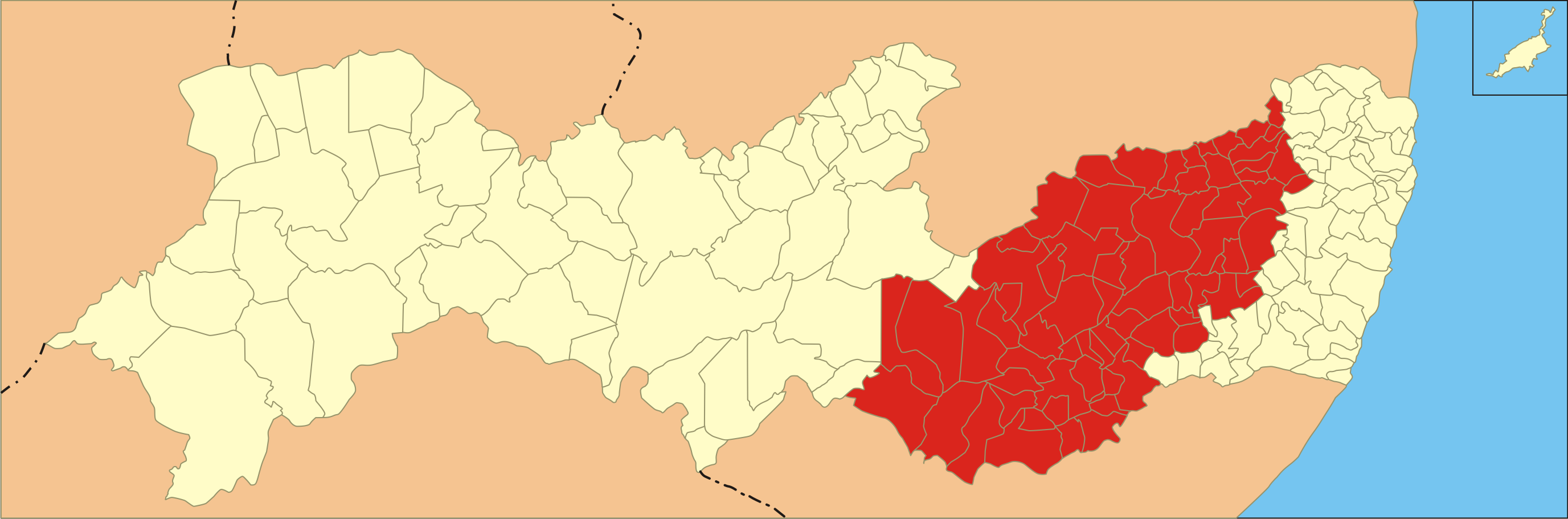 Localização da mesorregião no estado de Pernambuco.